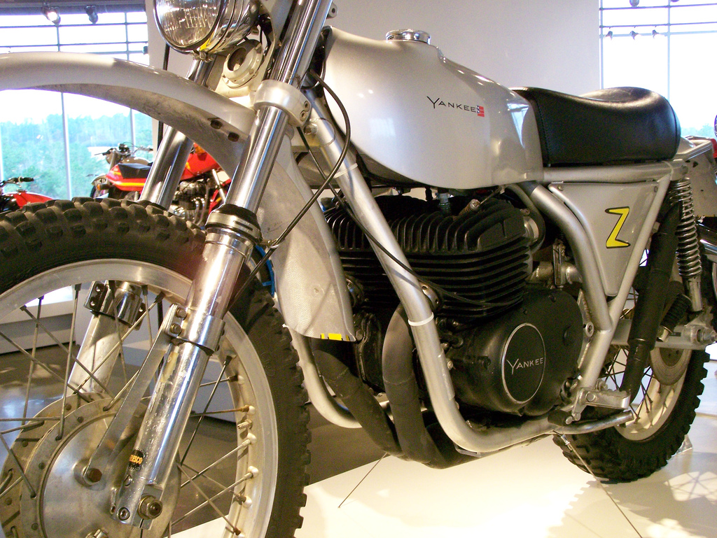 Yankee Z Ossa 500 bicilindrica due tempi del 1972